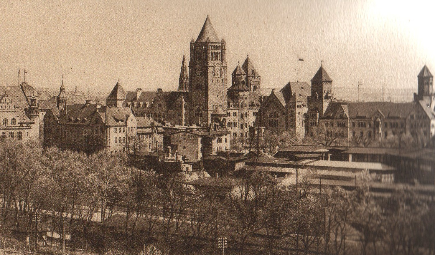 Zamek Cesarski w Poznaniu około 1929.